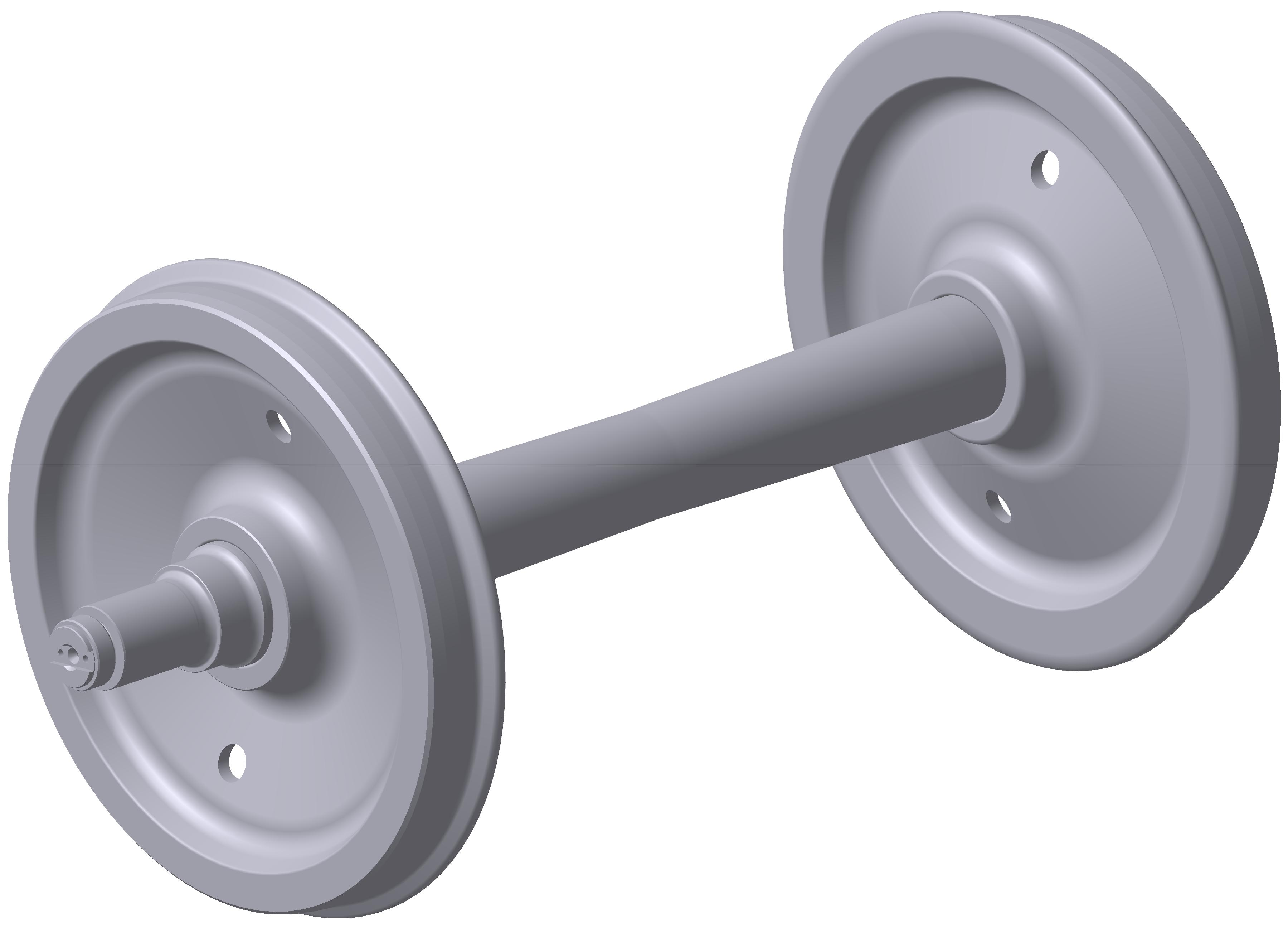 Колесная пара РУ1-950